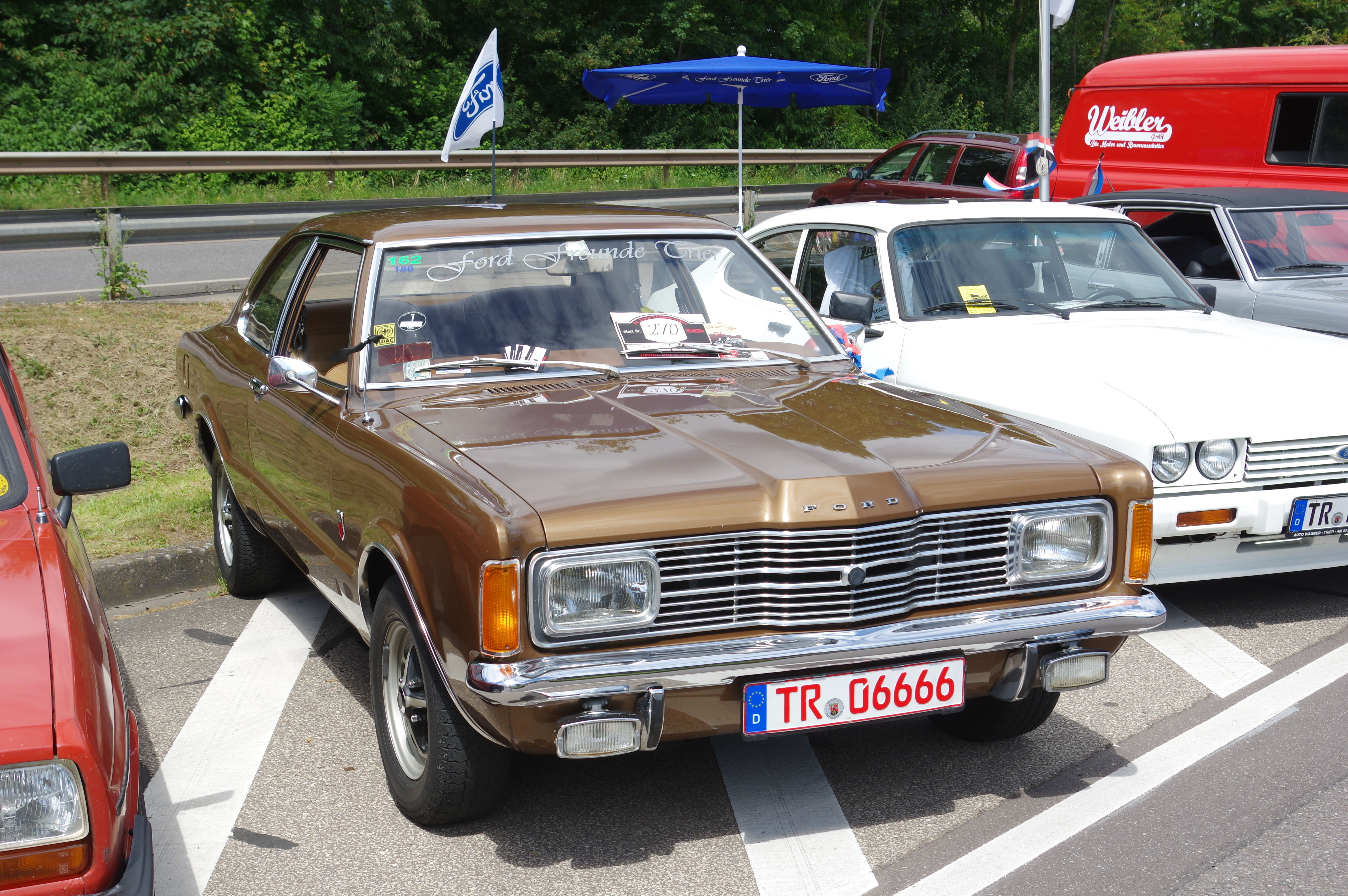 Ford Taunus XL, 1972, 88 PS , 32. Internationales Oldtimer Treffen Konz 2016, Das Nummernschild ist verfälscht!